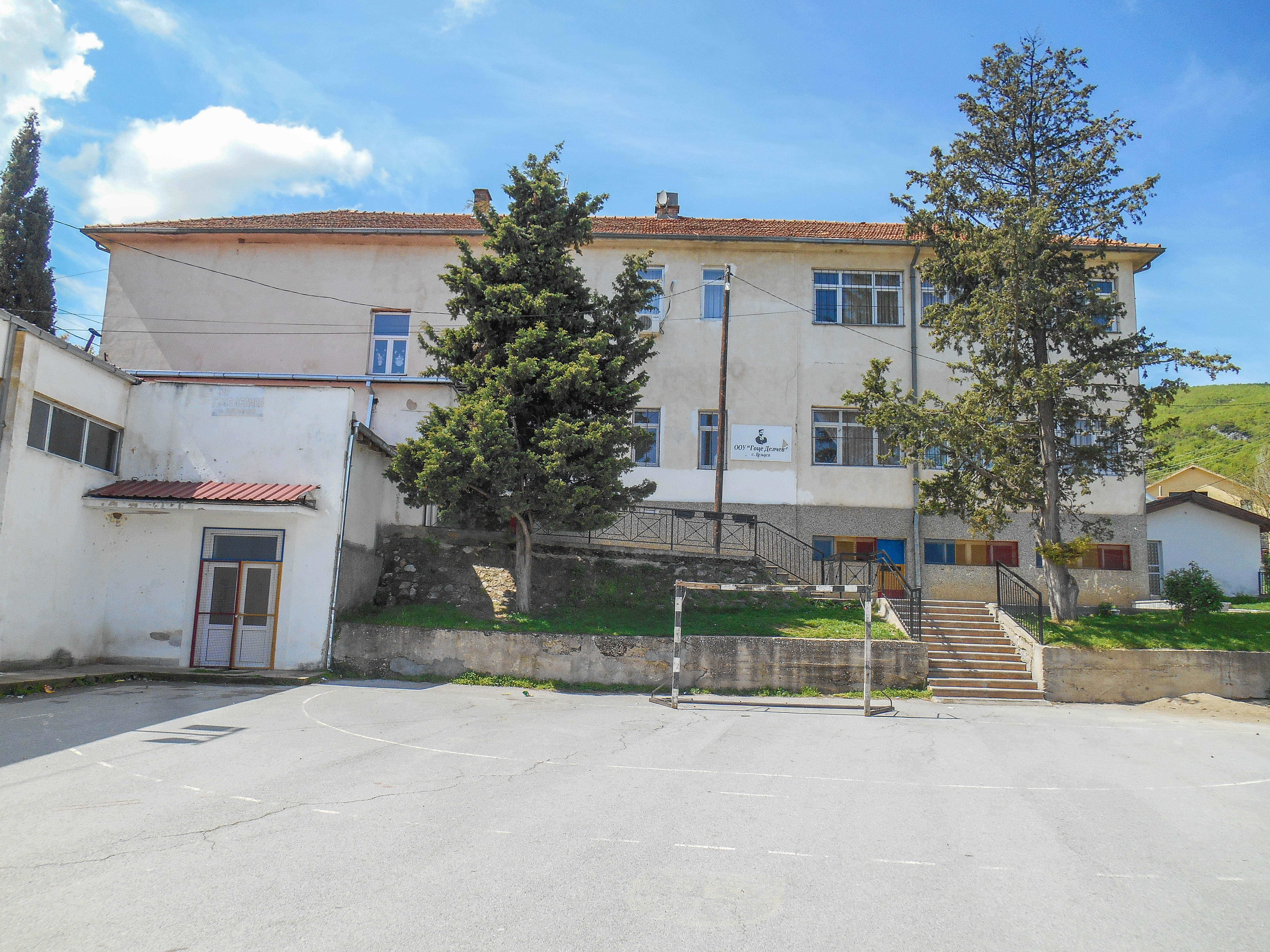 Училиште Гоце Делчев